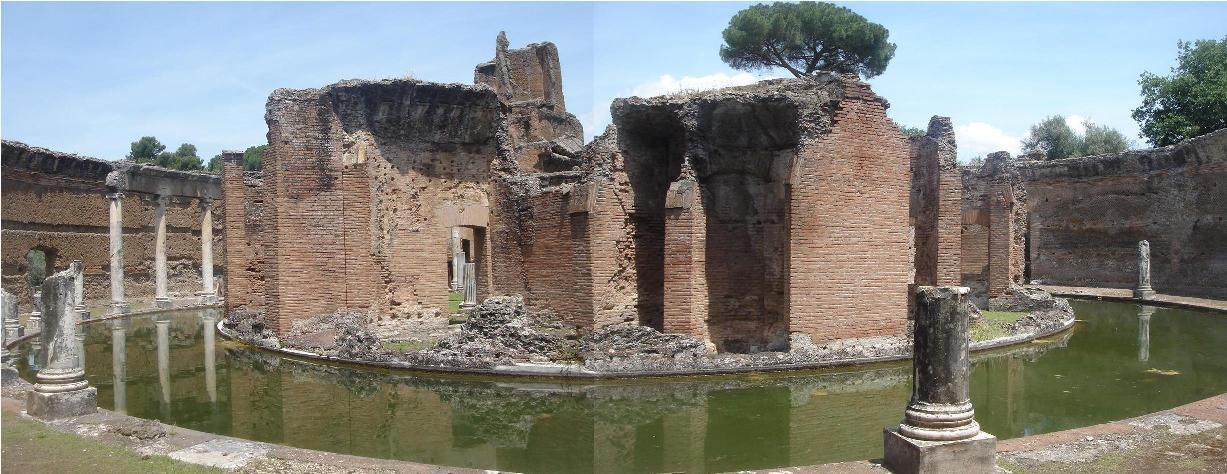 Description Vue du "théâtre maritime" d'Hadrien DateJune 2008Sourcephotographie prise par l'auteurAuthorFranck Devedjian franckdevedjian(at)hotmail(pt)com Vue du "théâtre maritime" d'Hadrien